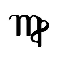 Firma de la mano de Max Stirner (Johann Kaspar Schmidt, 1806-1856); editada, mejorada y retocada la calidad de la imágen por KillOrDie. Se pueden encontrar otras firmas procedentes de manuscritos de Stirner en